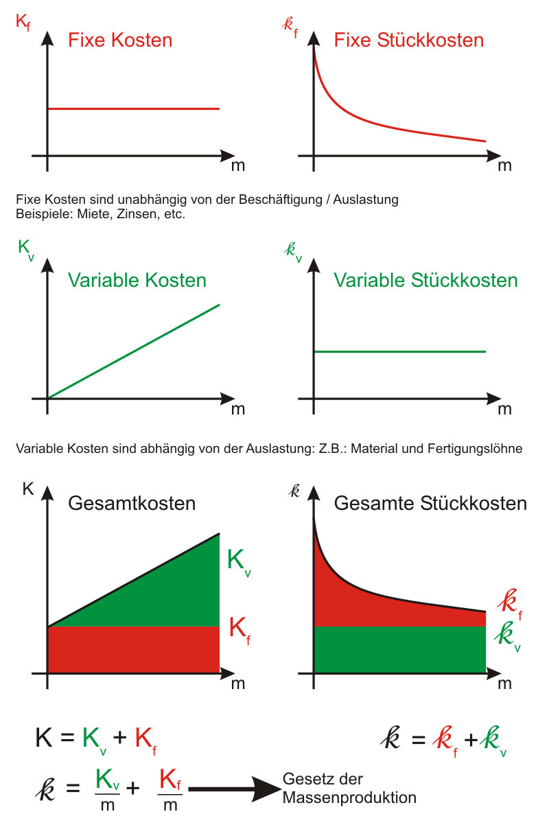 Auslastungs / Beschäftigungsabhängige Kosten